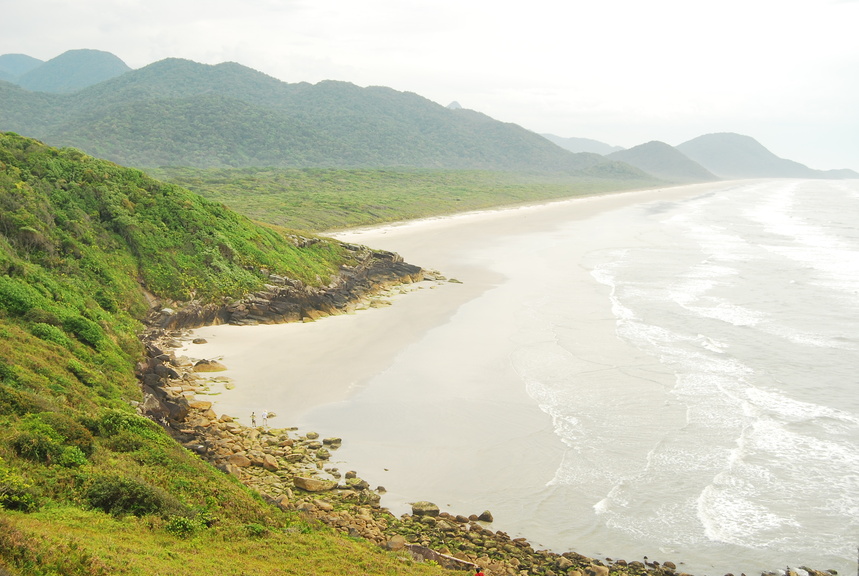 Insira_uma_descrição_para_sua_foto